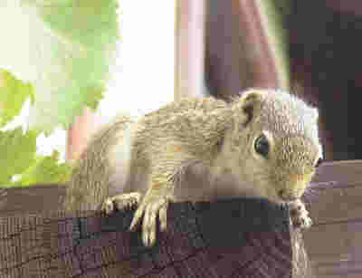 Heliosciurus (vermutlich gambianus), Guinea, Juni 2003